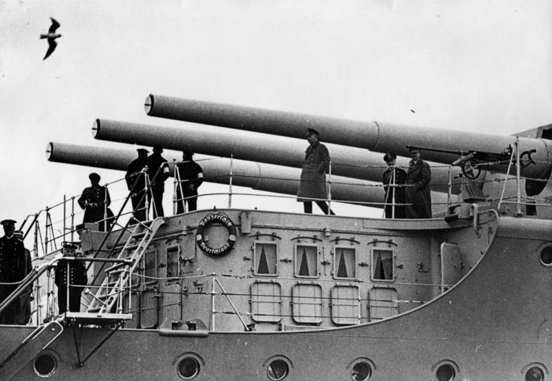 Panzerschiff "Deutschland", Adolf Hitler Scherl Bilderdienst Berlin Der Führer an Bord der "Deutschland"; Reichskanzler Adolf Hitler hat sich an Bord des Panzerschiffes "Deutschland" eingeschifft, um an den Übungen teilzunehmen, zu denen das Panzerschiff ausgelaufen ist. UBz: den Führer (ganz rechts) mit dem Chef der Marineleitung Admiral [Erich] Raeder, an Bord der "Deutschland". (Die Aufnahme musste von einem Begleitschiff aus grösserer Entfernung gemacht werden, daher die Unschärfe). [April 1934] Abgebildete Personen: Hitler, Adolf: Reichskanzler, Deutschland Raeder, Erich: Großadmiral, Oberbefehlshaber der Kriegsmarine, Deutschland (GND 118743511)